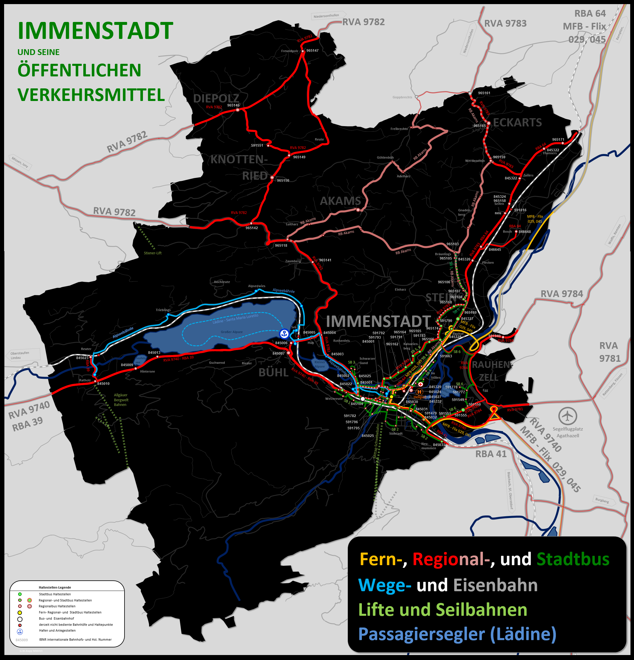 Public traffic in Immenstadt